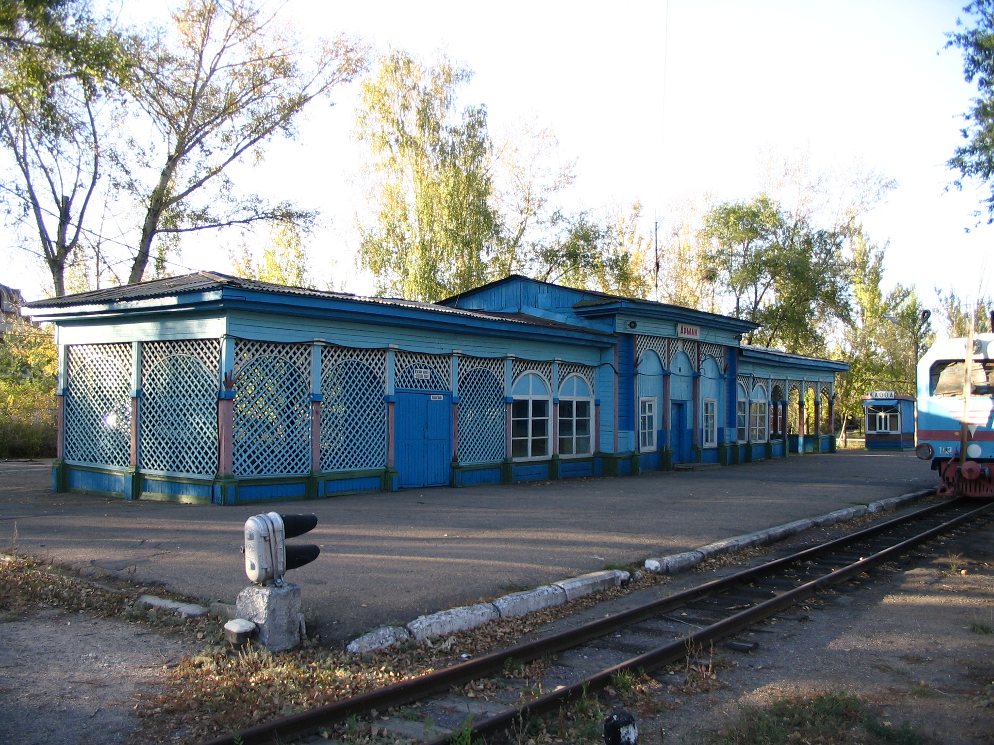 Станция «Арман» быв. «Комсомольская». Карагандинская детская железная дорога.